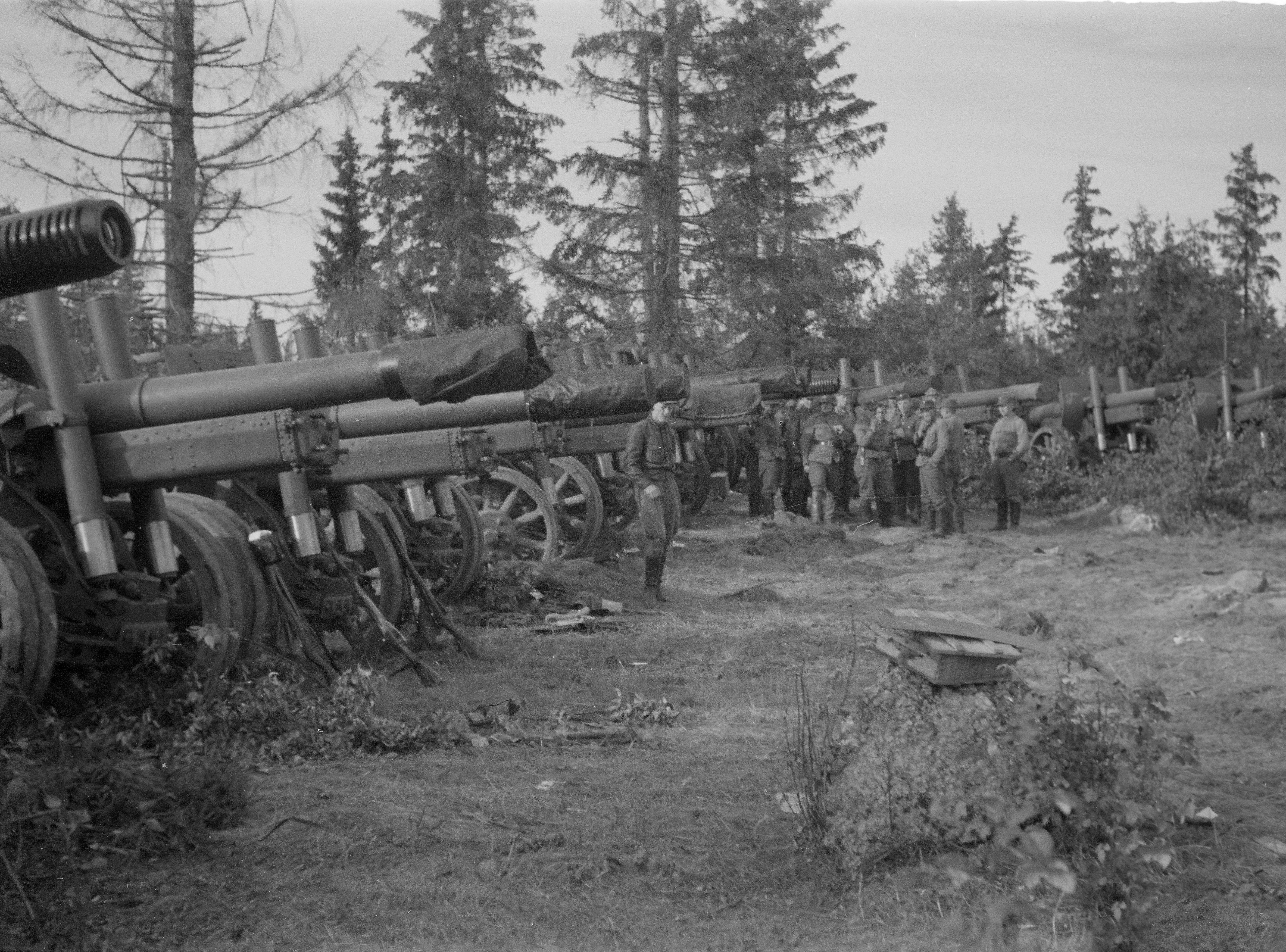 Гаубицы-пушки МЛ-20 101-го гаубичного артиллерийского полка, захваченные финской армией в котле у деревни Порлампи.